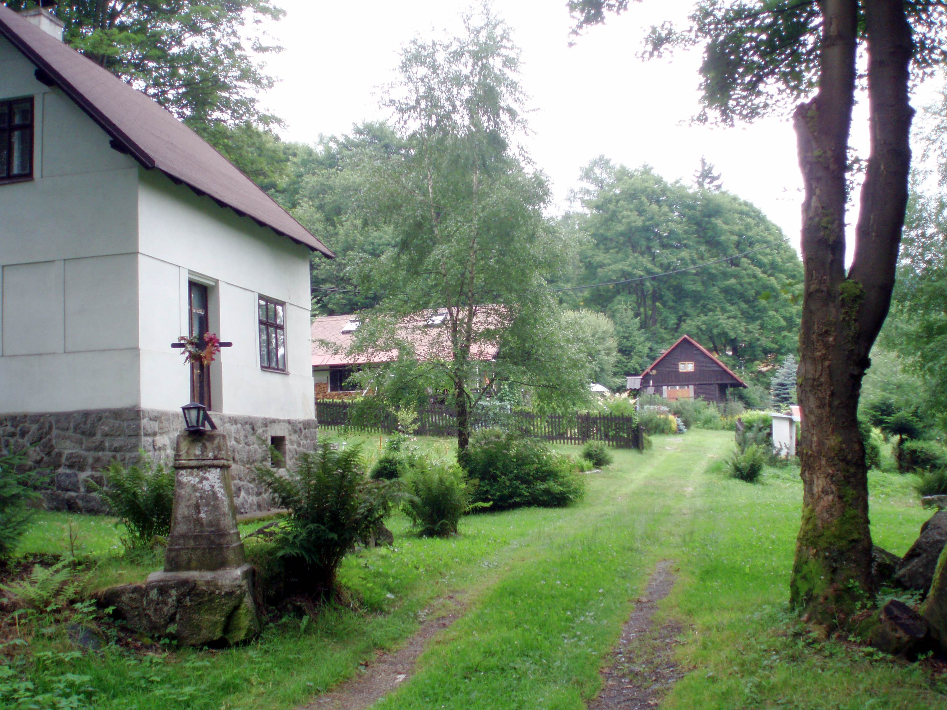 In Ullersloh